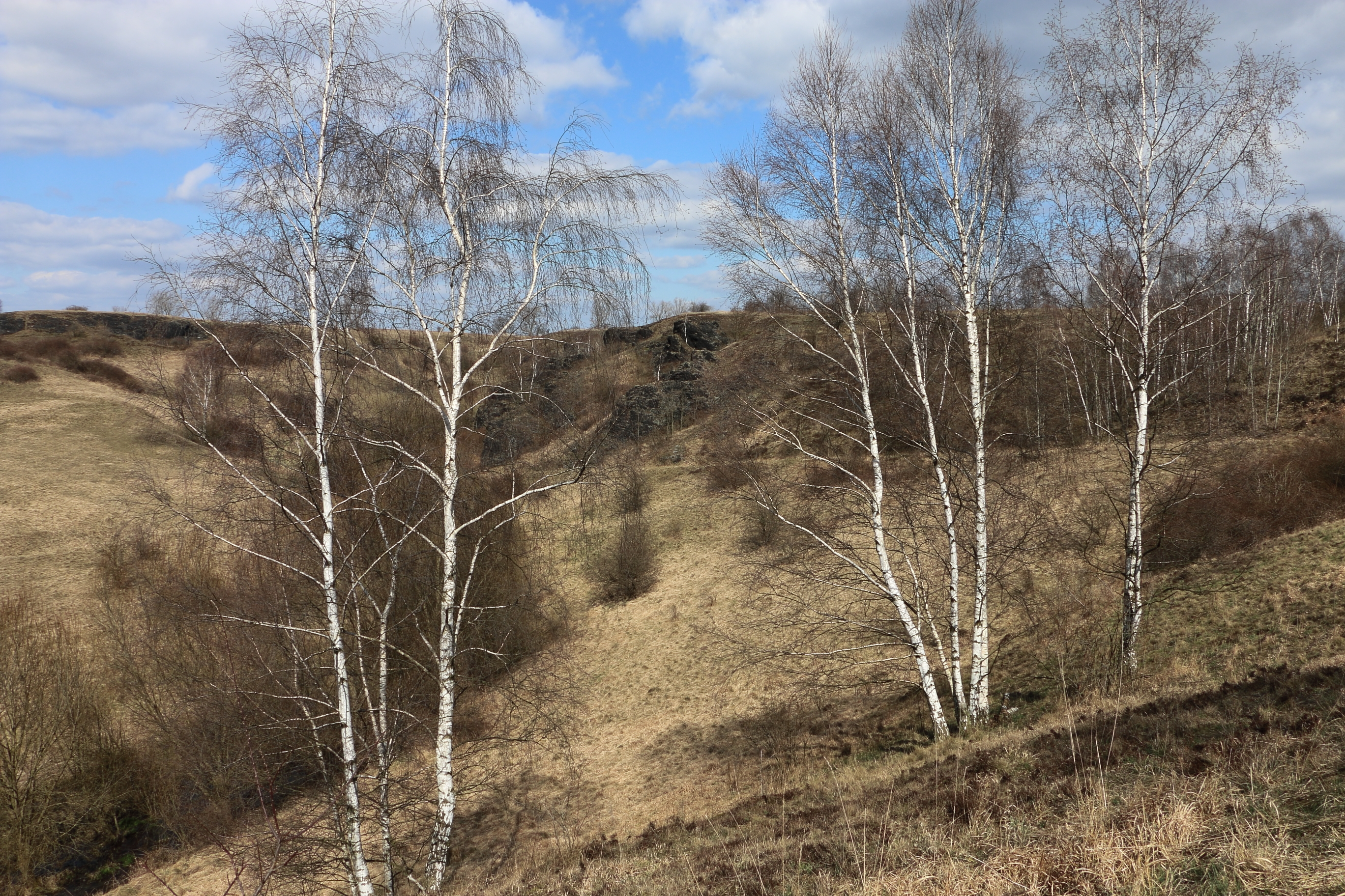 Magerrasen und Trockengebiete im Naturschutzgebiet „Porphyrlandschaft bei Brachwitz“ in Sachsen-Anhalt. Schafherden sorgen für die Landschaftspflege.